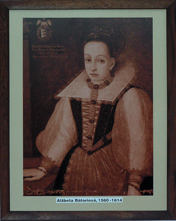 Alžbeta Bátoriová